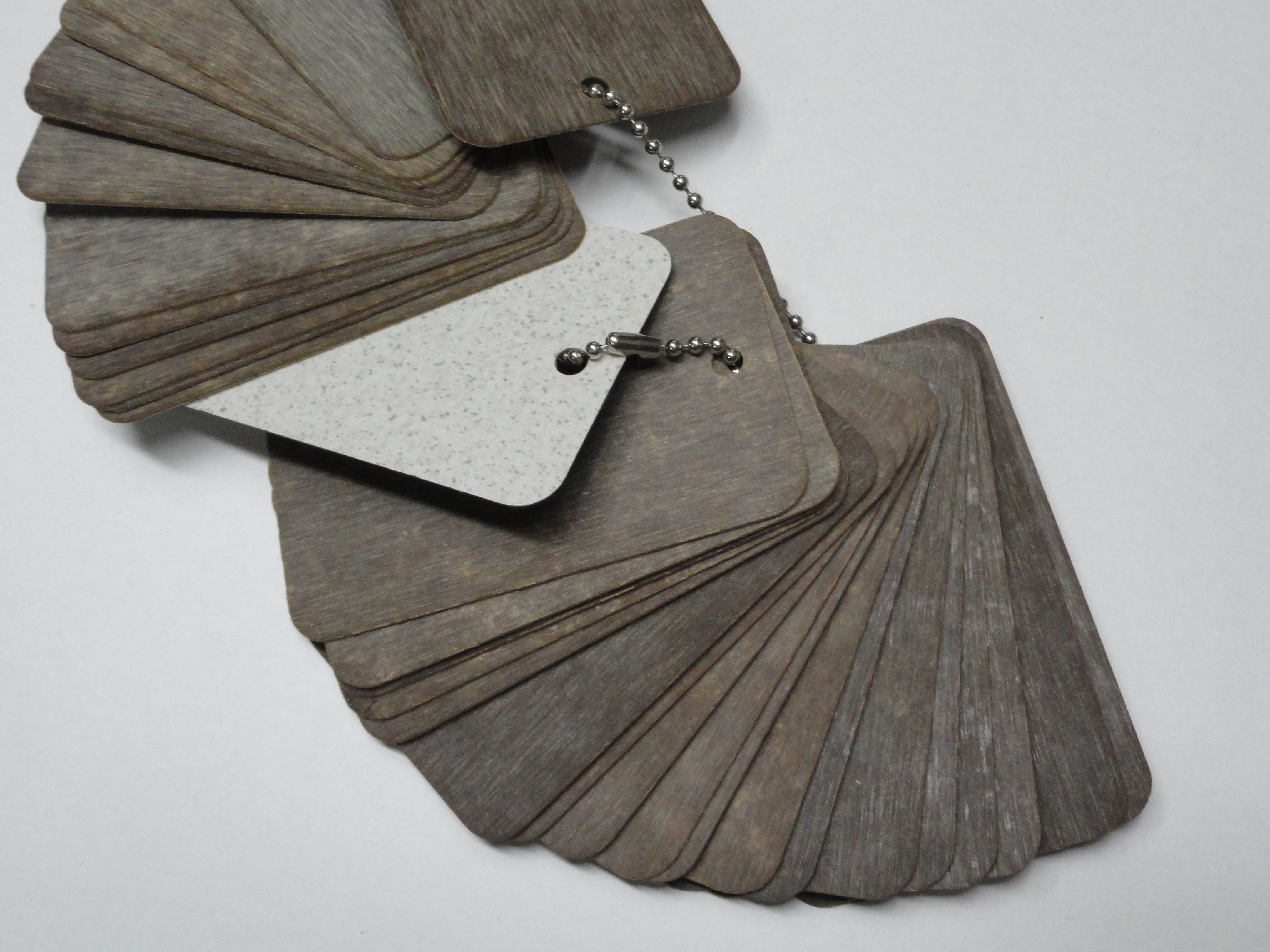 Декоративный бумажно-слоистый пластик ДБСП Decorative HPLaminate